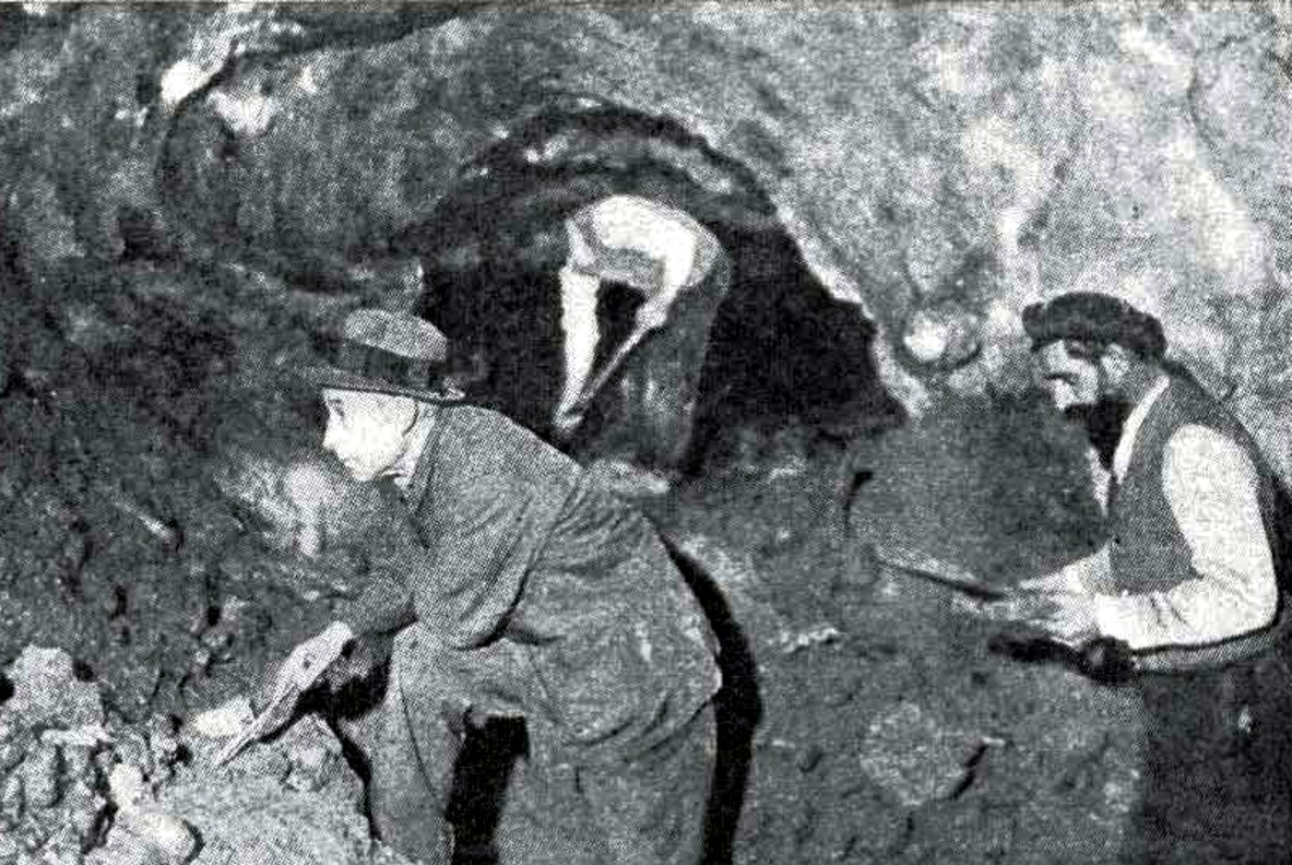 Cueva de los Hornucos, Suano, España. Exploración de 1934 del padre Carbayo, director del Museo Prehistórico de Santander.